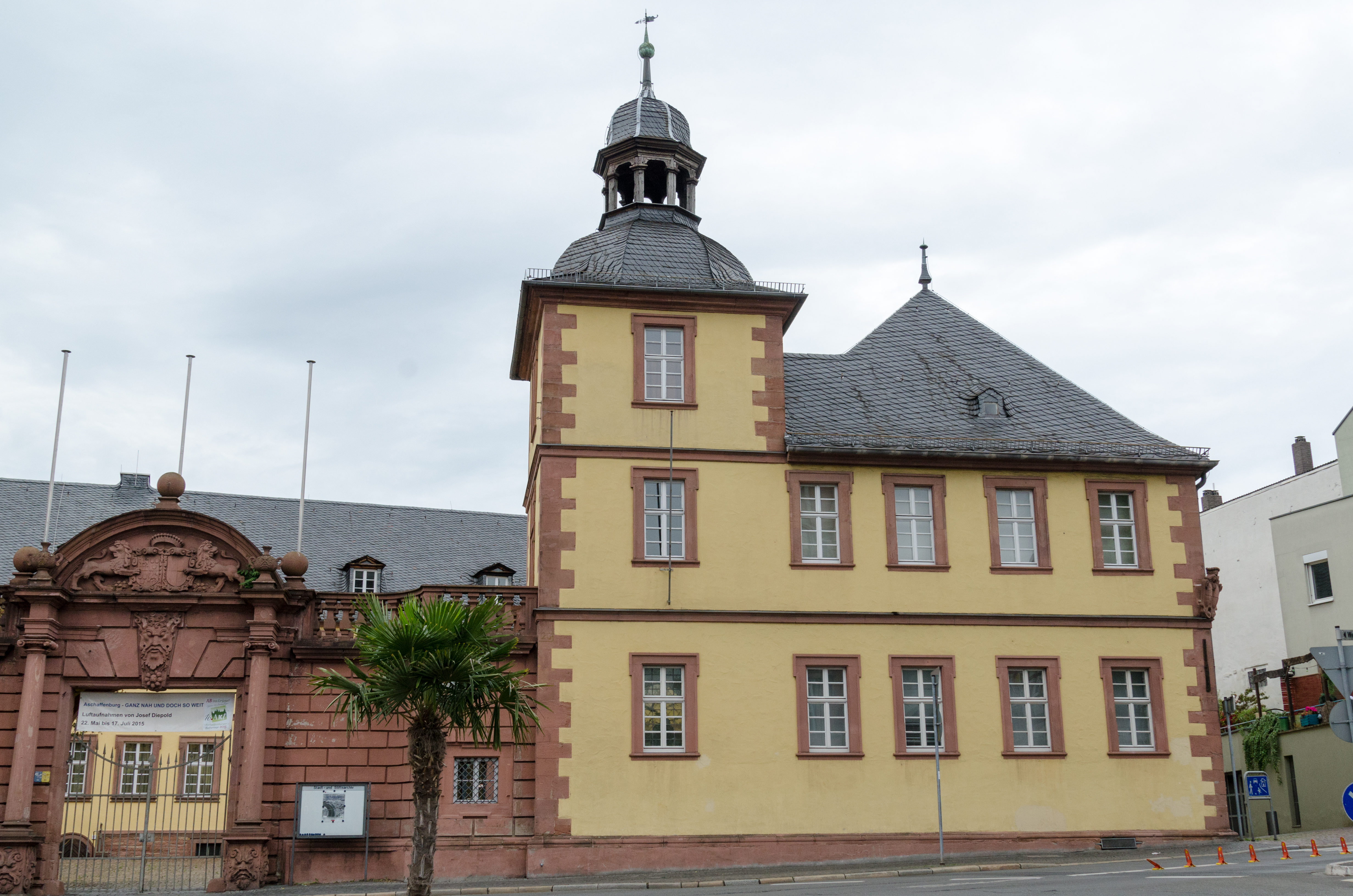 Aschaffenburg, Wermbachstraße 15